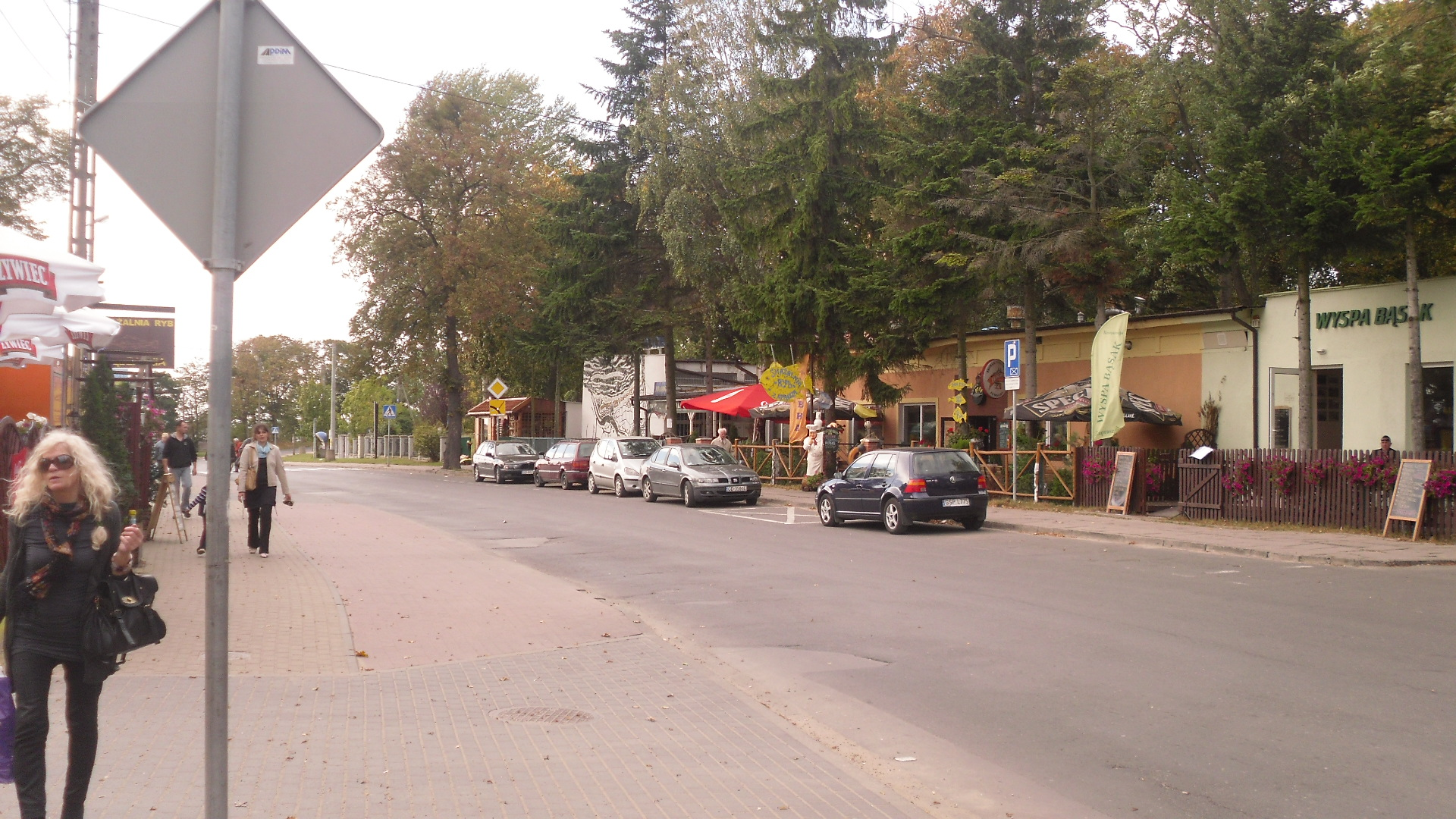 Ulica Turystyczna jedna z głównych ulic na Wyspie Sobieszewskiej Gdańsk